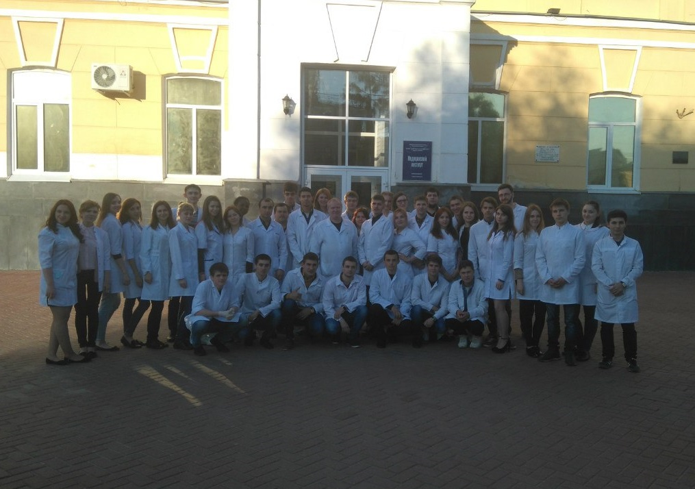 Медицинский институт в Тамбове